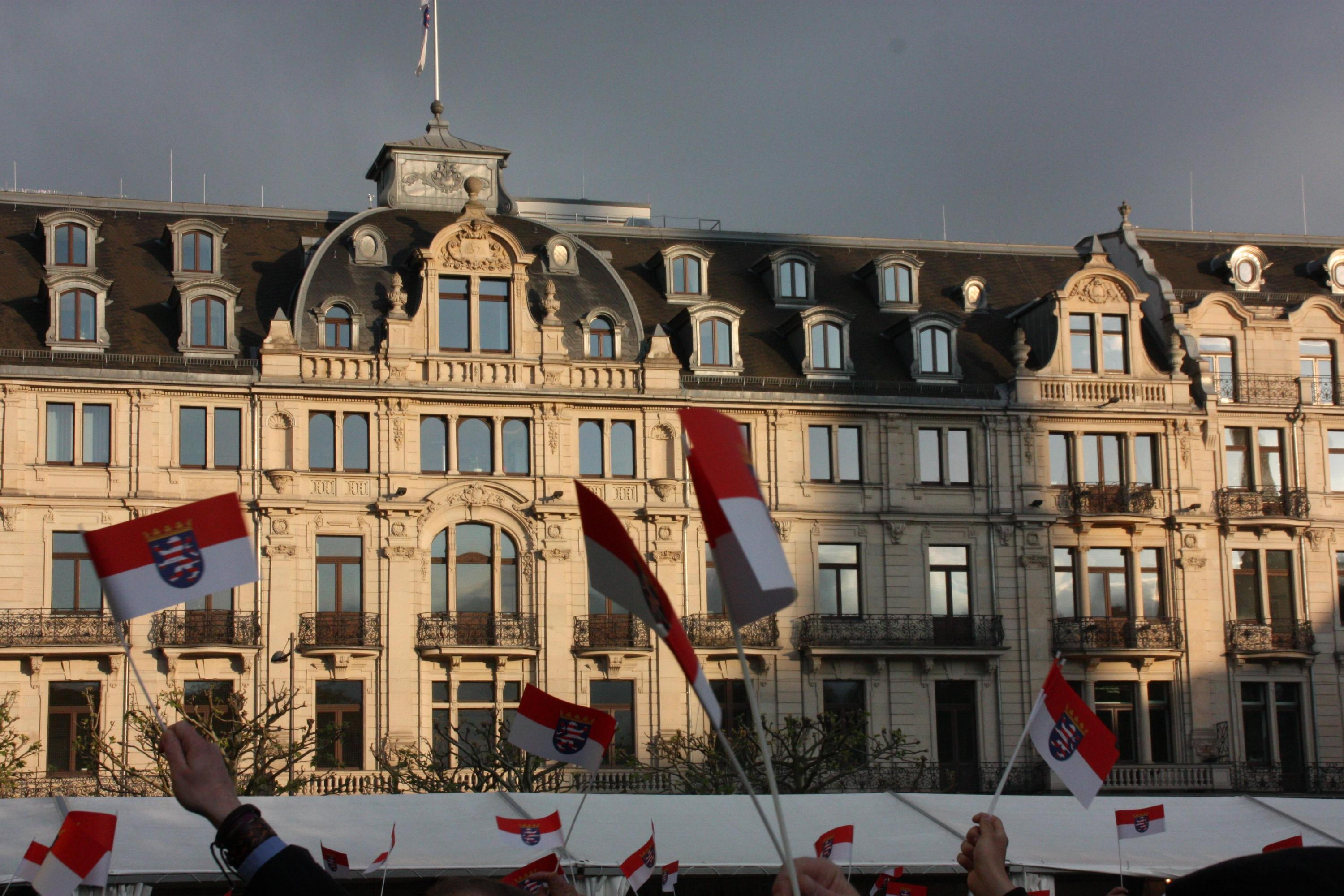 Feiernde Hessen schwenken Mini-Landesdienstflaggen vor der hessischen Staatskanzlei in Wiesbaden. Aufgenommen anlässlich eines Auftritts der Rodgau Monotones auf dem Kranzplatzfest 2013